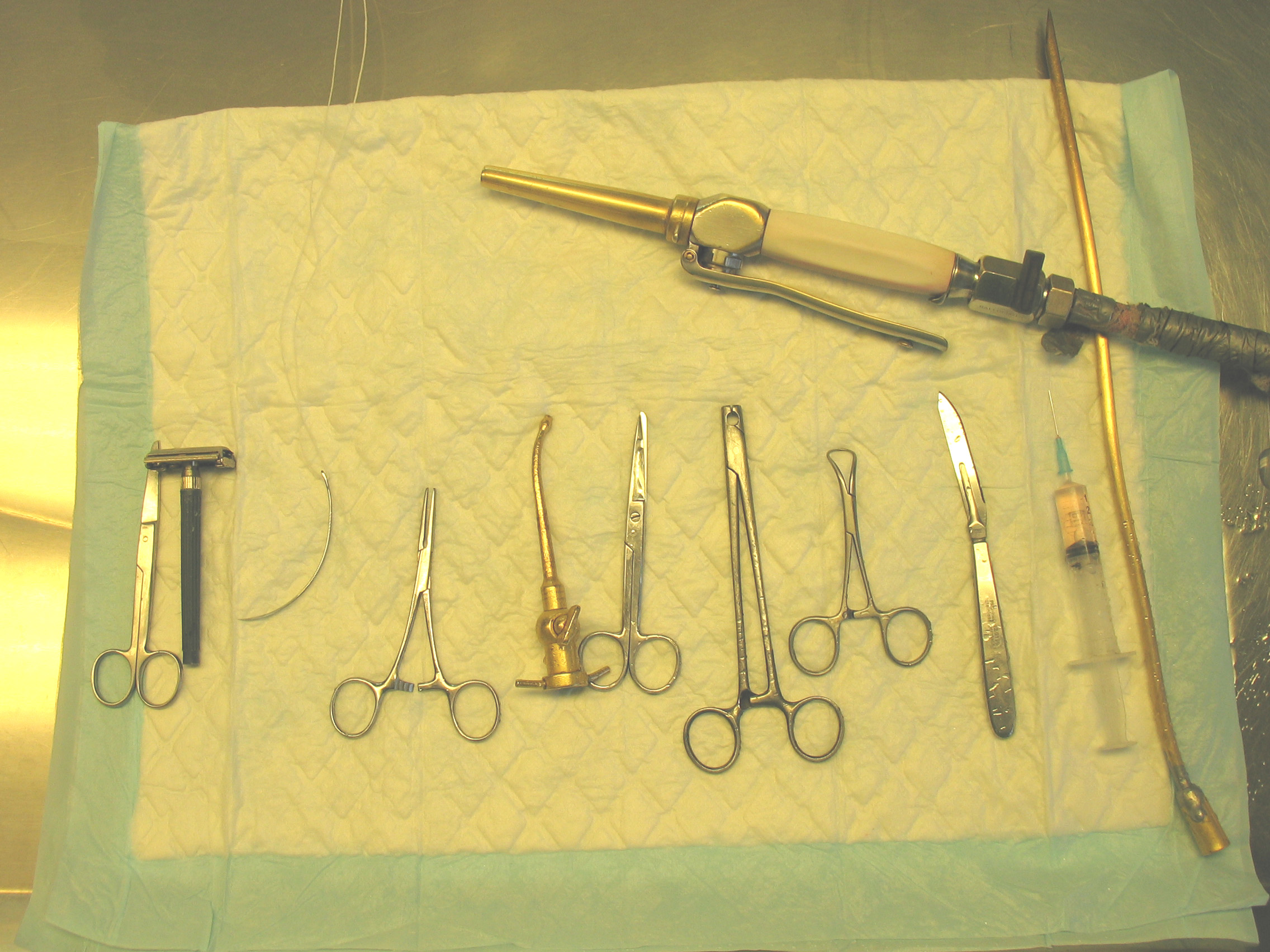 Utensils_used_for_embalming